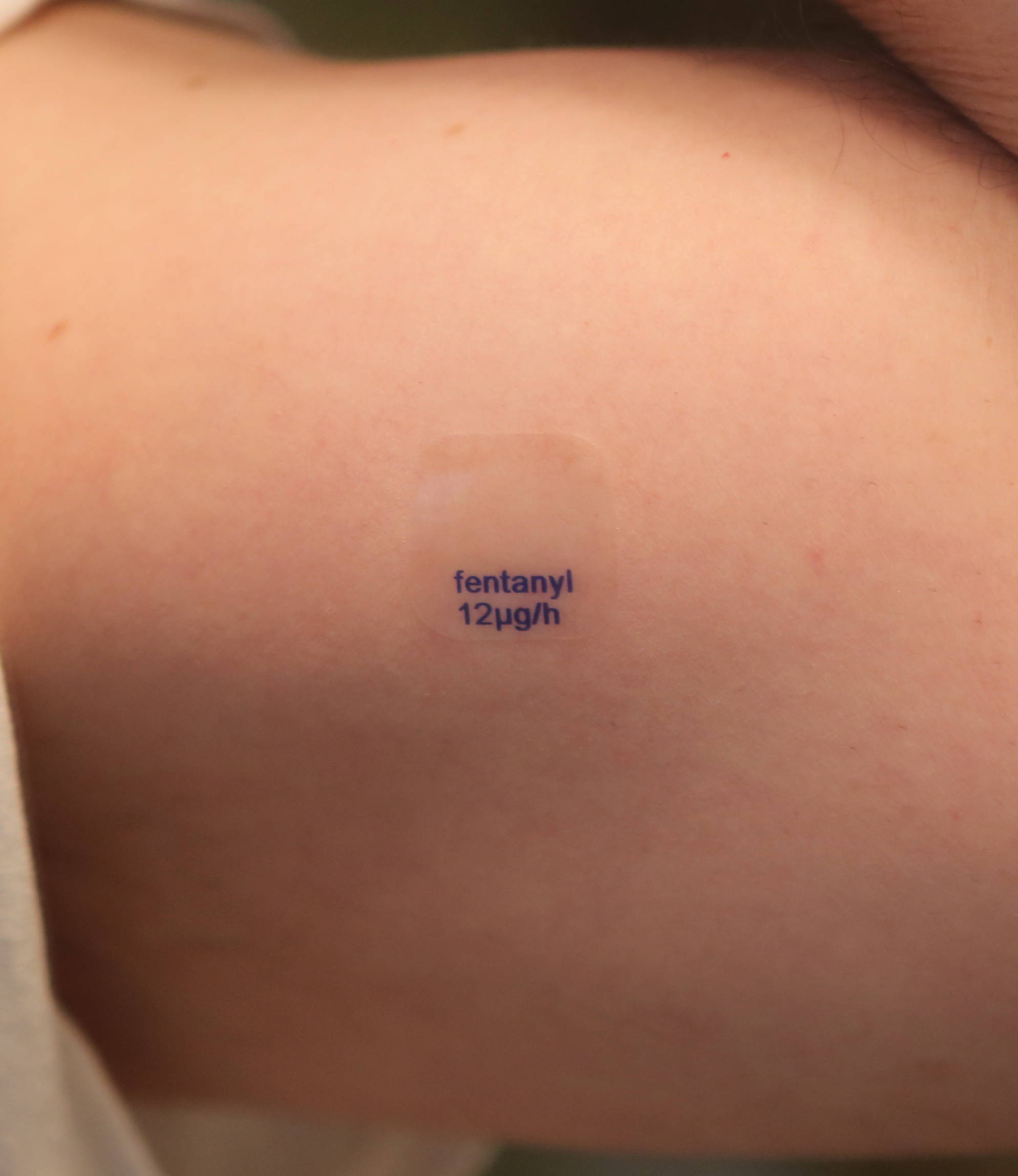 מדבקת פנטניל בקצב שחרור של 12 מיקרוגרם בשעה, מודבקת לעור.